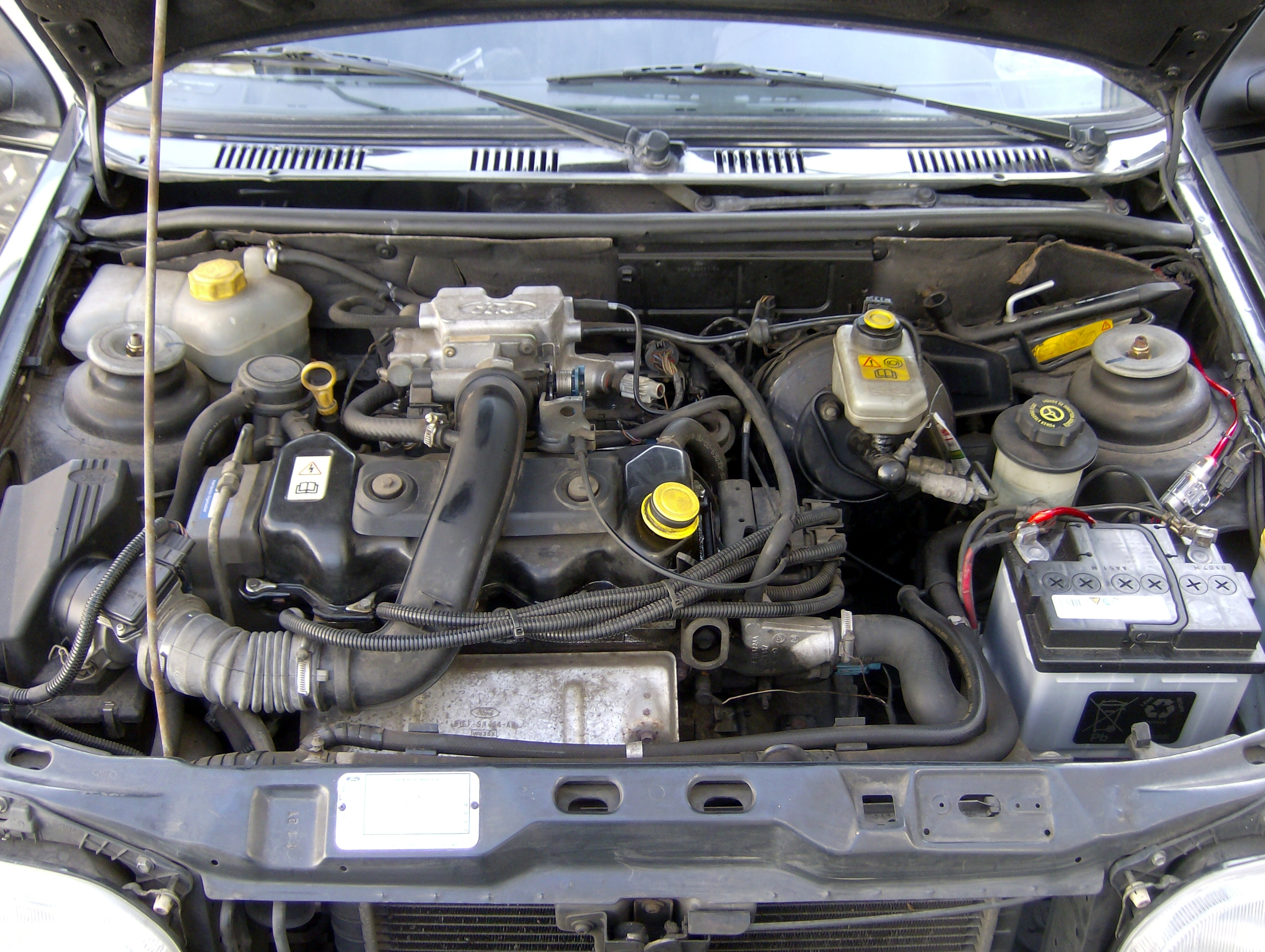 Ford Fiesta Future, MK3, GFJ